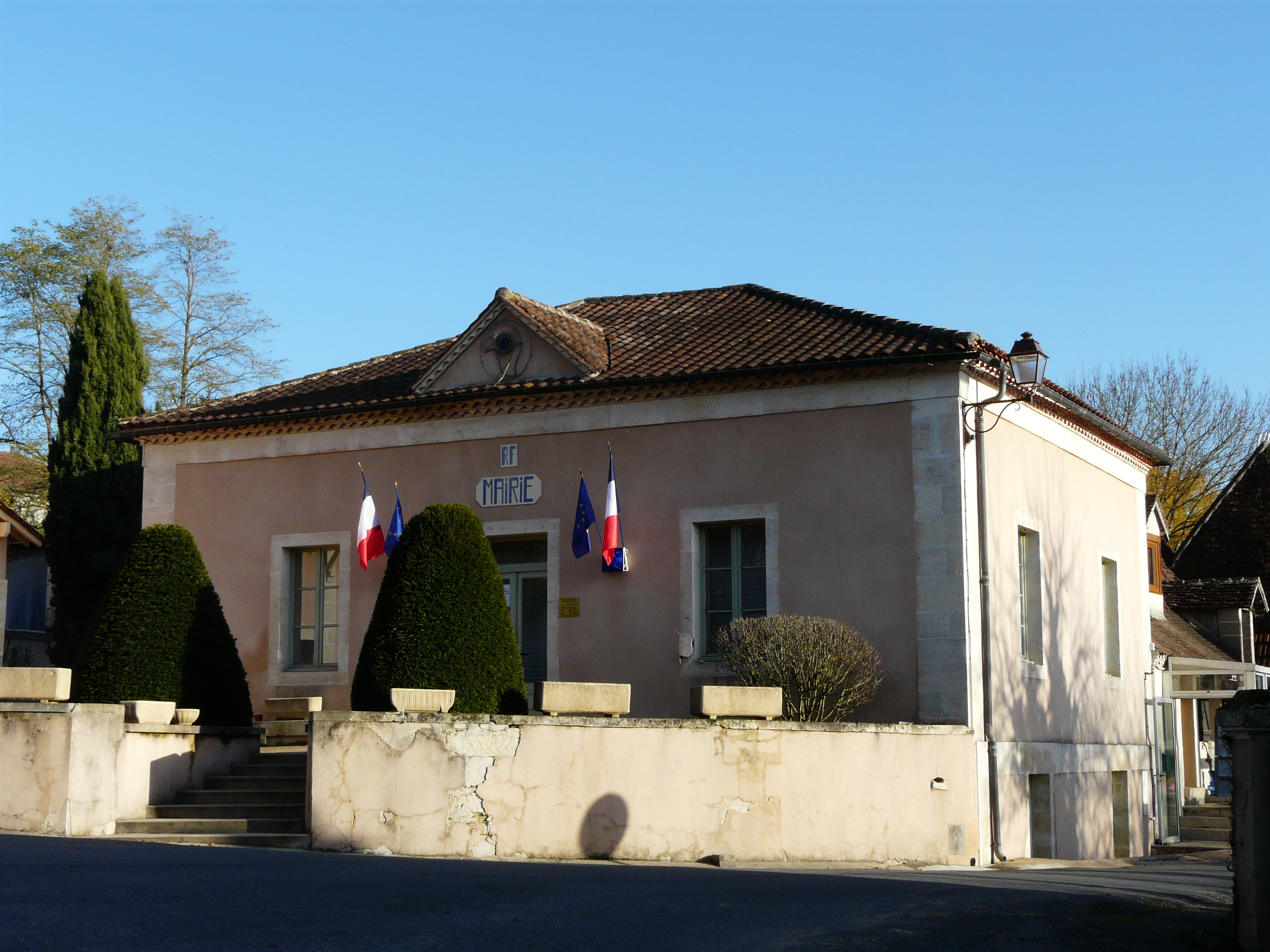 La mairie de Milhac-d'Auberoche, Dordogne, France.